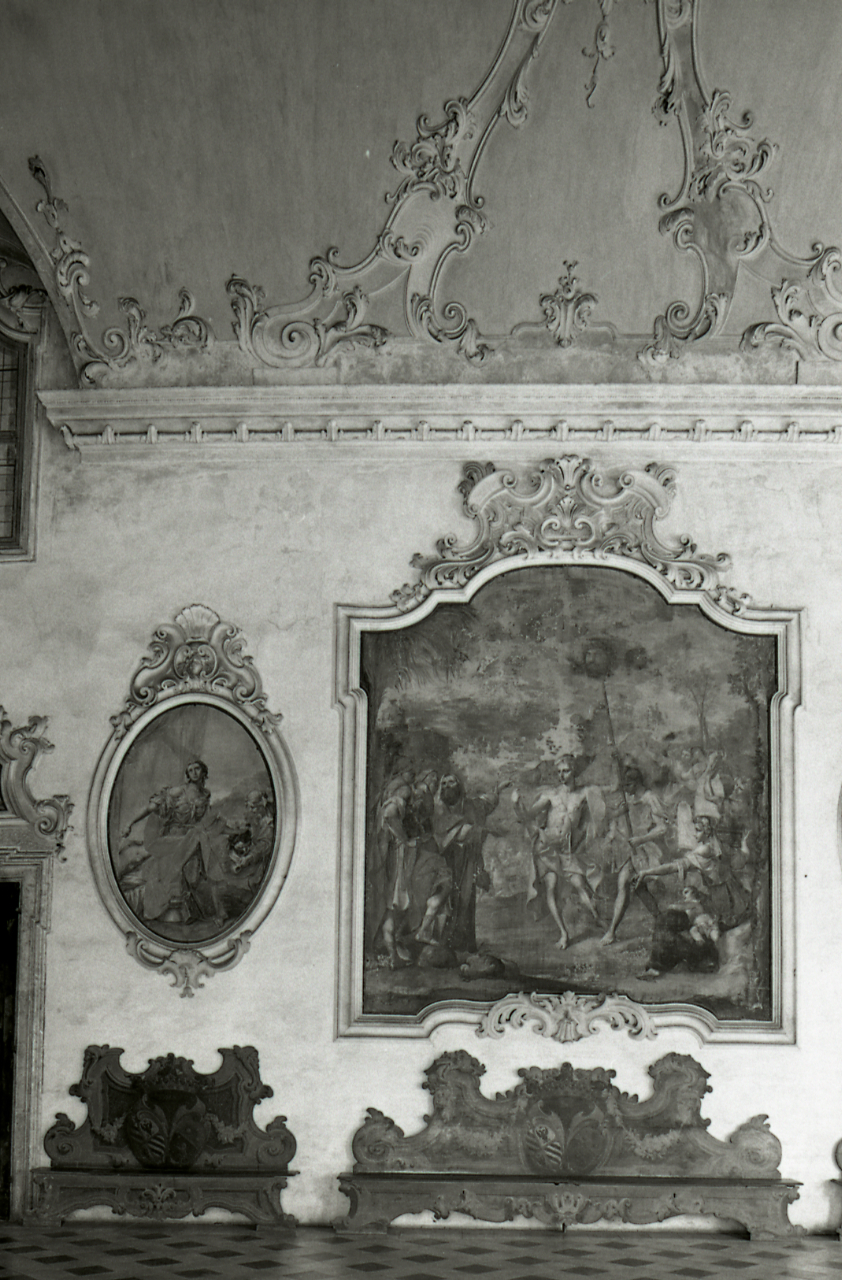 Servizio fotografico : Mantova, 1979 / Paolo Monti. - Strisce: 7, Fotogrammi complessivi: 37 : Negativo b/n, gelatina bromuro d'argento/ pellicola ; 35 mm. - ((Sul portanegativi: N[I]K[MA]T FP4. - (2):. - 1A-19A = esterni;. - 20A-37A = interni. - Occasione: Mostra a Parma e catalogo. - Fonte: Agenda di Paolo Monti: Nikon Leika 3001-/ Monti 1978 (1978-1982), presso Archivio Paolo Monti. - Fonte: Monografia: Palazzi di Piacenza dal Barocco al Neoclassico, Torino, Istituto Bancario San Paolo (1979). - Fonte: Fattura di Paolo Monti: IV. Commesse/ Fattura n. 29/ Fotografie per mostra Società e cultura nella Piacenza del '700 (1979/10/05), presso Archivio Paolo Monti. - Fonte: Fattura di Paolo Monti: IV. Commesse/ Fattura n. 36/ Fotografie eseguite a Mantova - Palazzi del '700, per mostra Parma e catalogo (1979/10/16), presso Archivio Paolo Monti